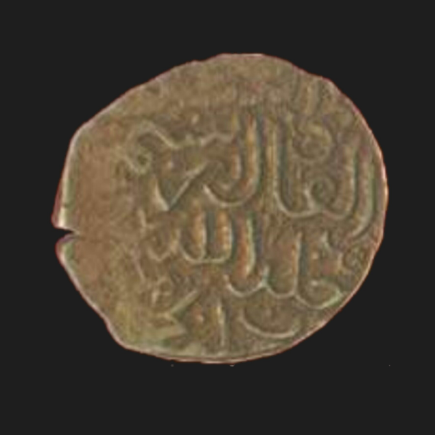 Ağqoyunlu, Rüstəm, Ərzincan, təngə, gümüş